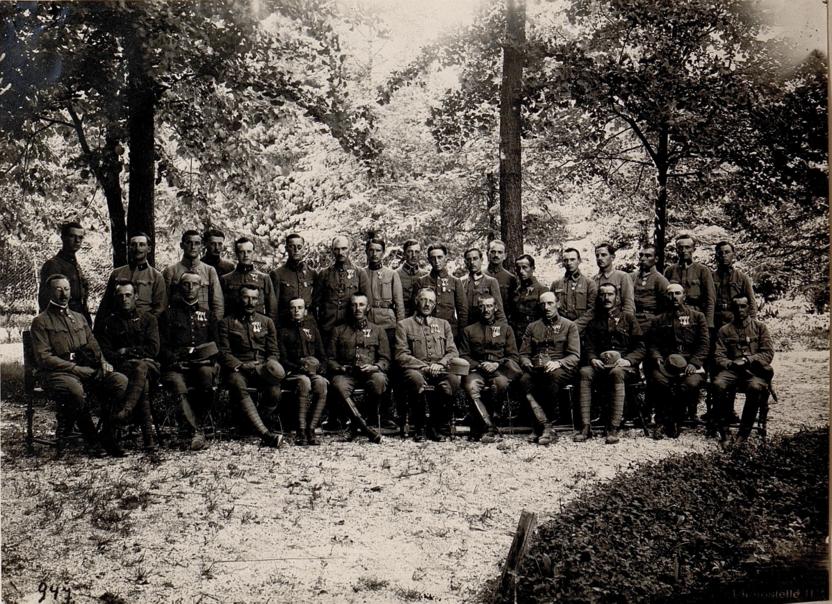 Trient. Feldjäger-Bataillon nach den schweren Kämpfen bei Ortigara.